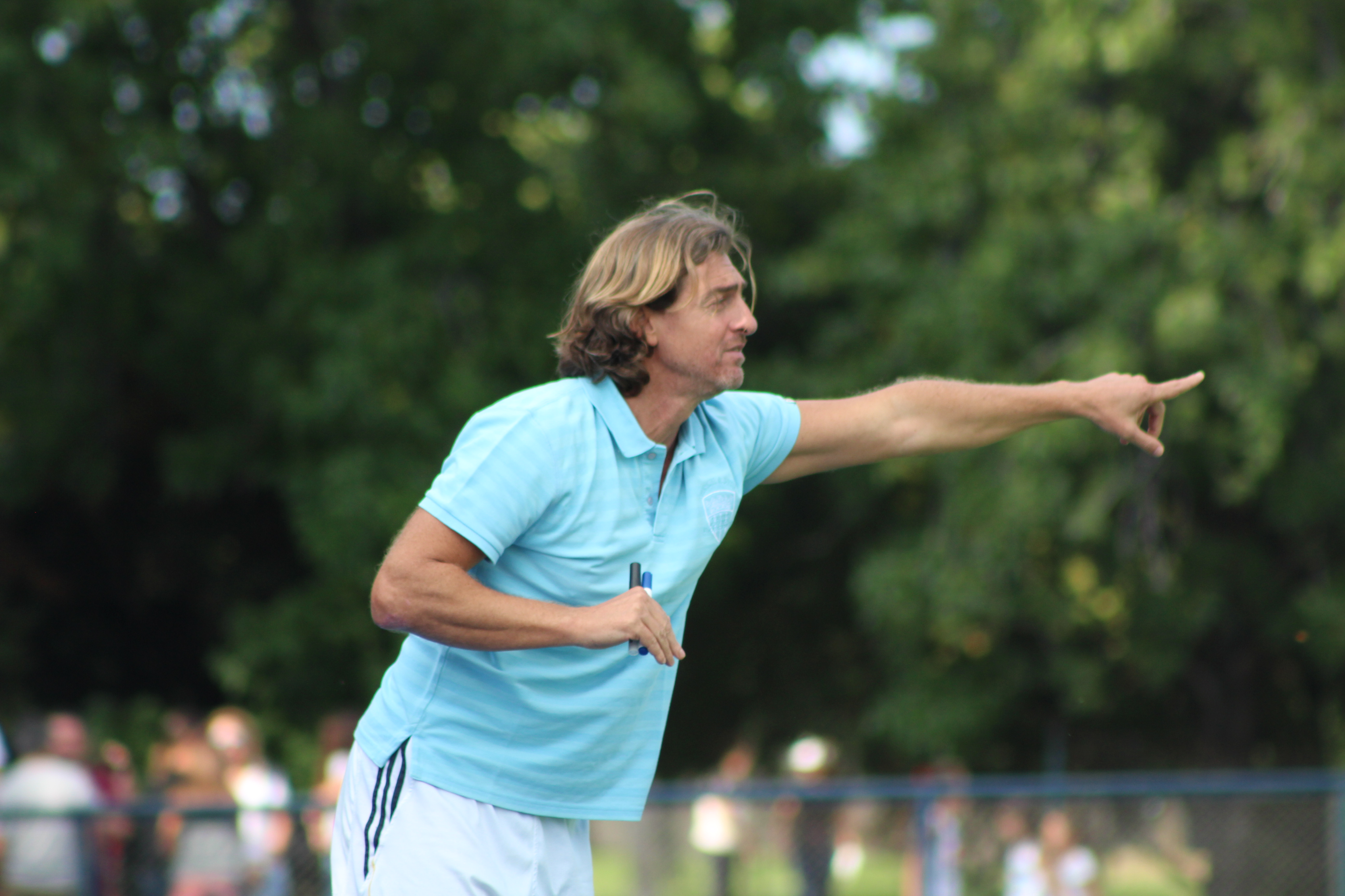 Fernando Ferrara